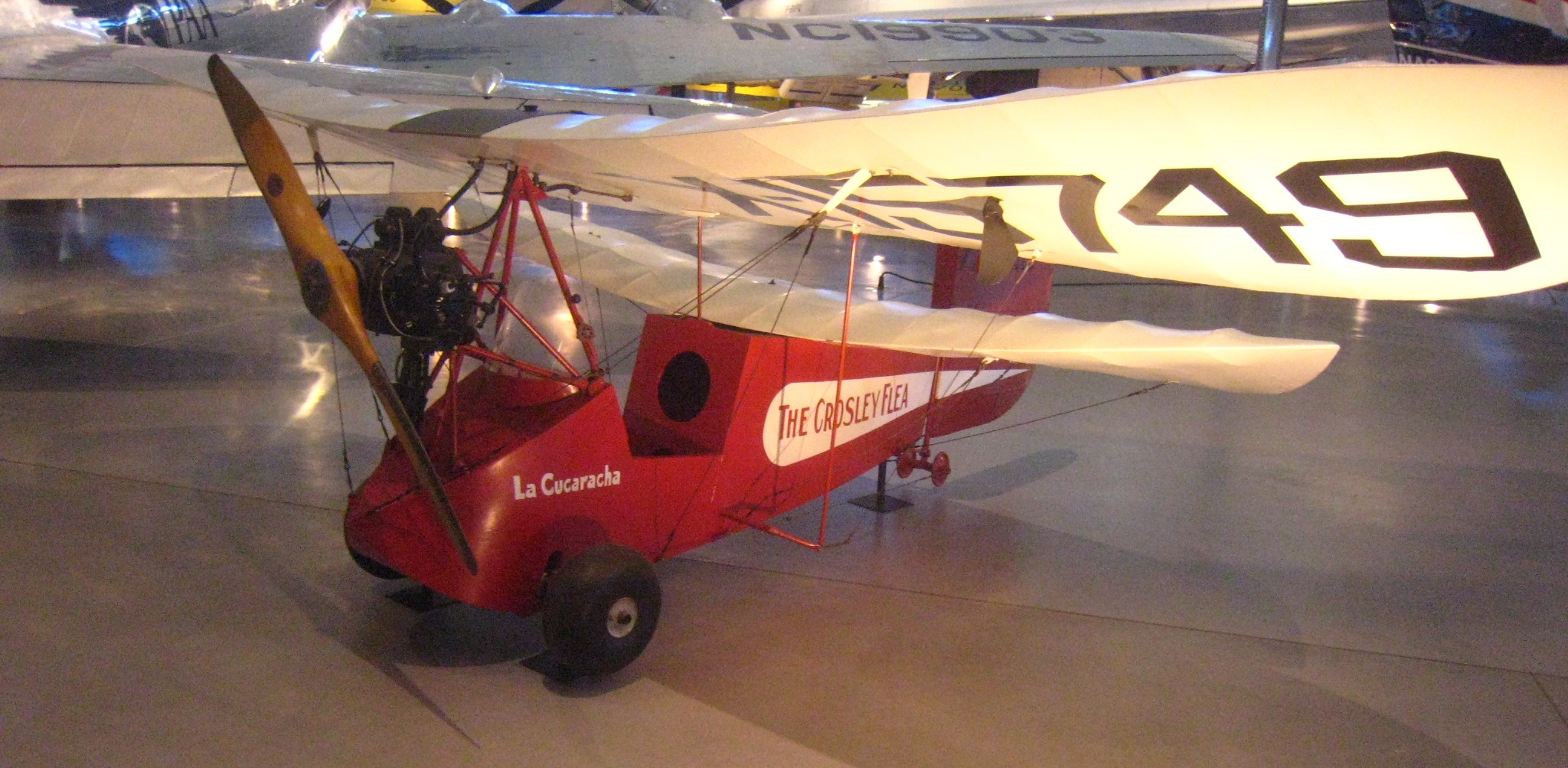 Mignet HM.14 Pou du Ciel "La Cucaracha"